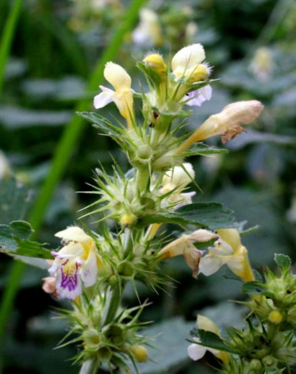 Galeopsis tetrahit